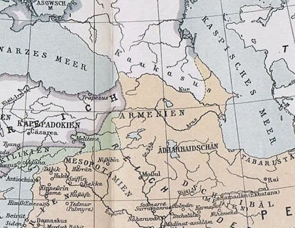 Deitsch: Reich der Kalifen um 750 mit Zusatzkarte Verbreitung des Islam um 1350